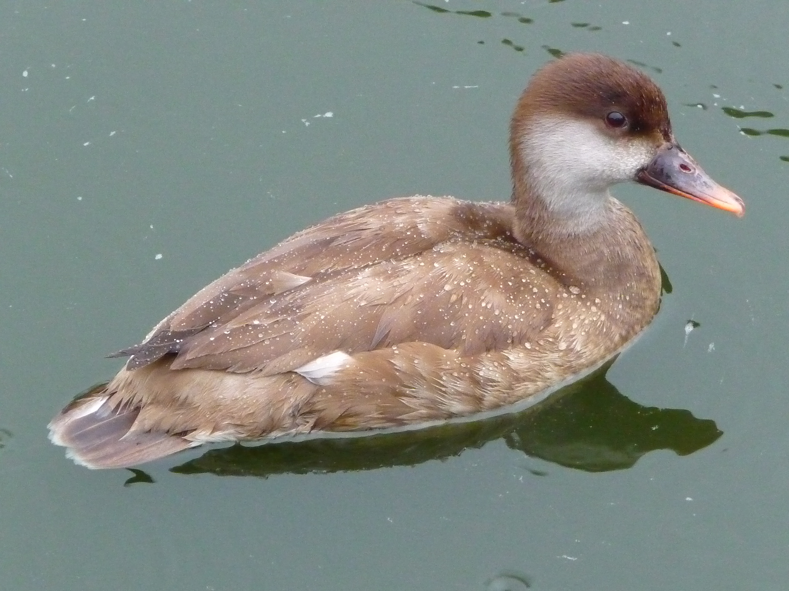 Weibliche Kolbenente (Netta rufina)